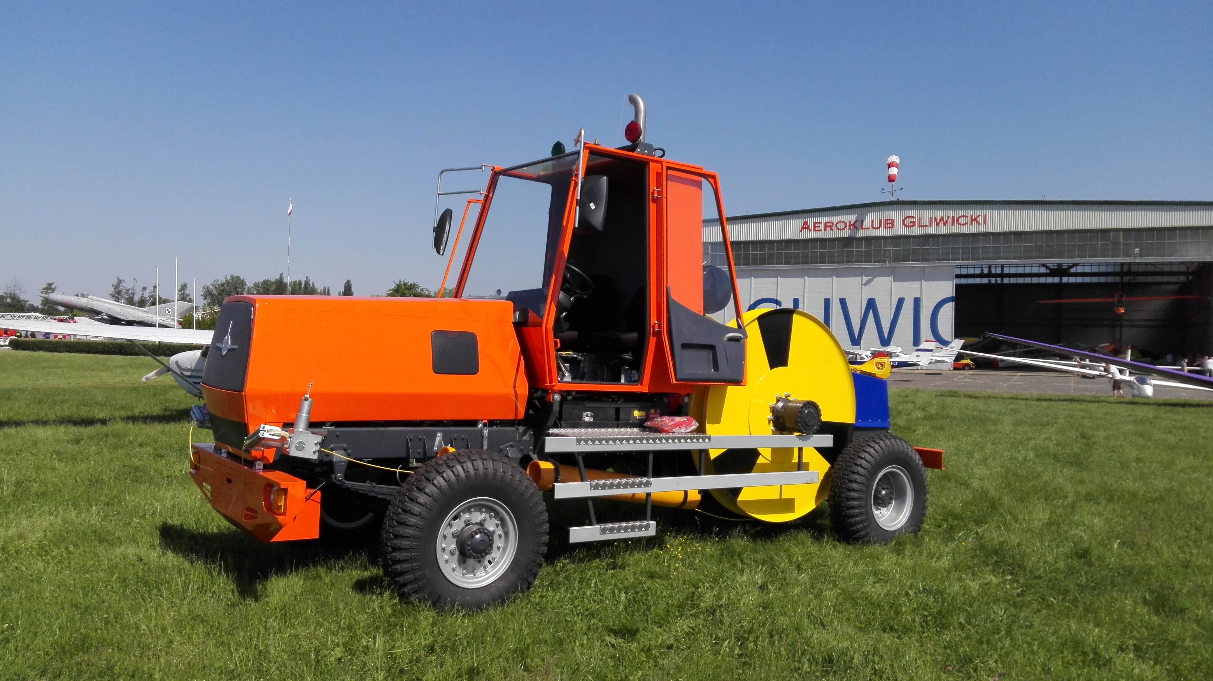 Wyciągarka szybowcowa WS-02-JK wyprodukowana przez firmę Moto-Hurt z Ropczyc, użytkownik Aeroklub Gliwicki, podczas Pikniku Lotniczego „Śląskie Służby Mundurowe Dzieciom”